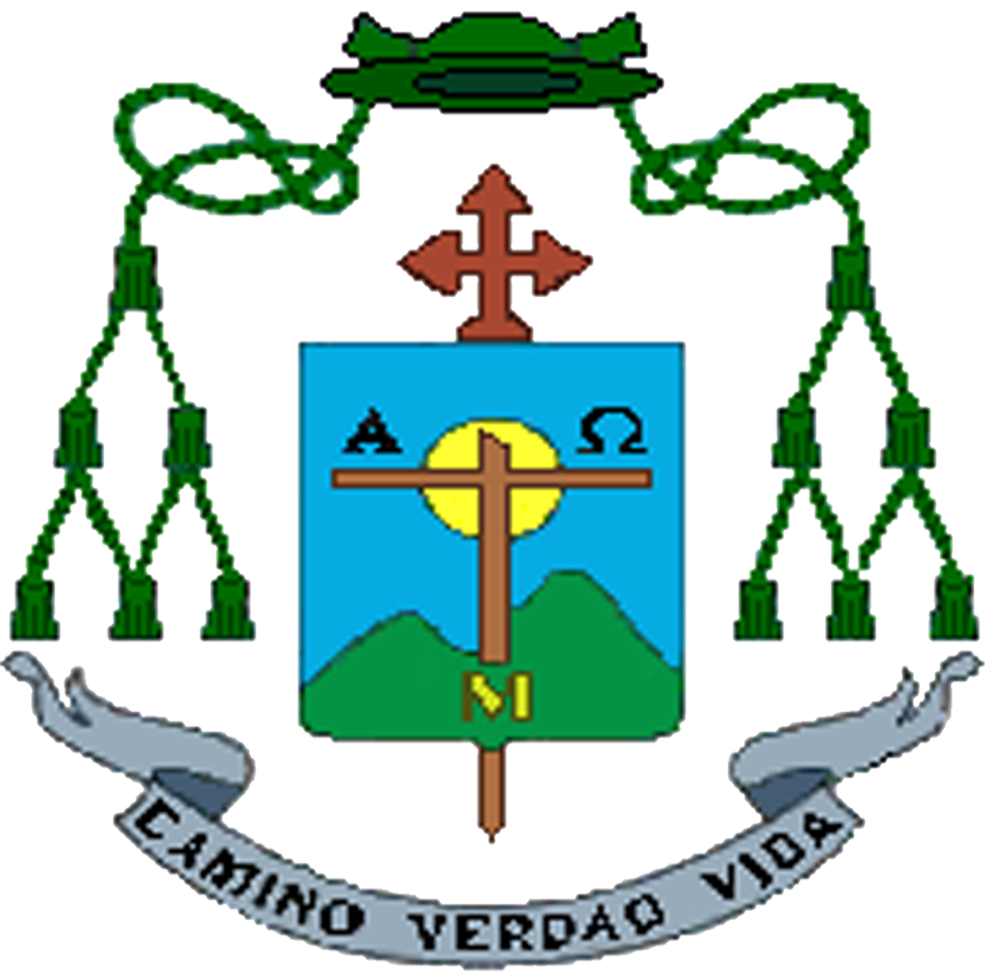 Escudo episcopal de Monseñor William Enrique Delgado Silva